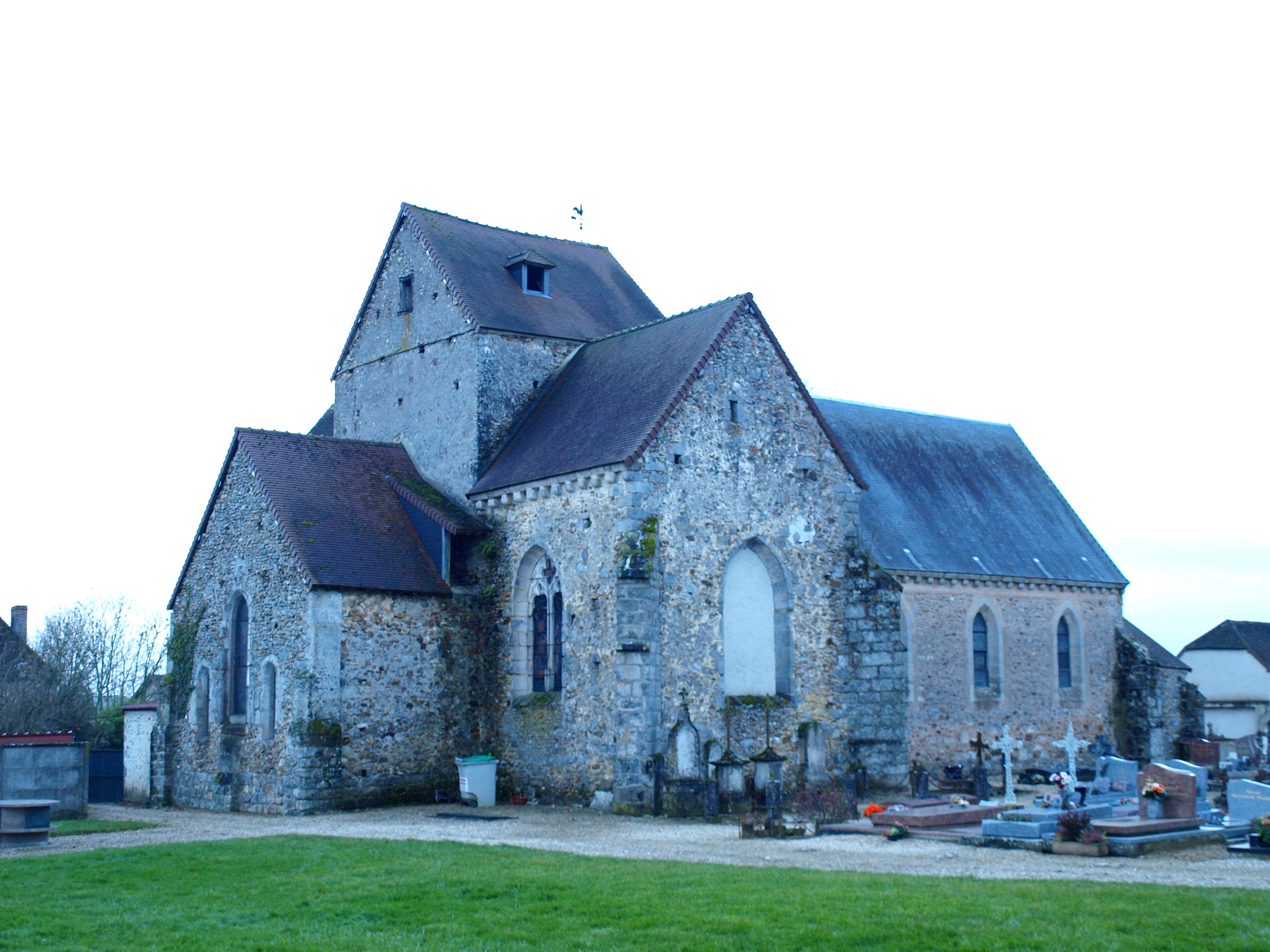 Champguyon (Marne, France) ; église